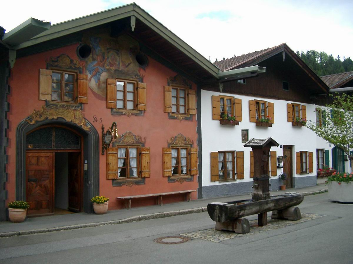 Mittenwald